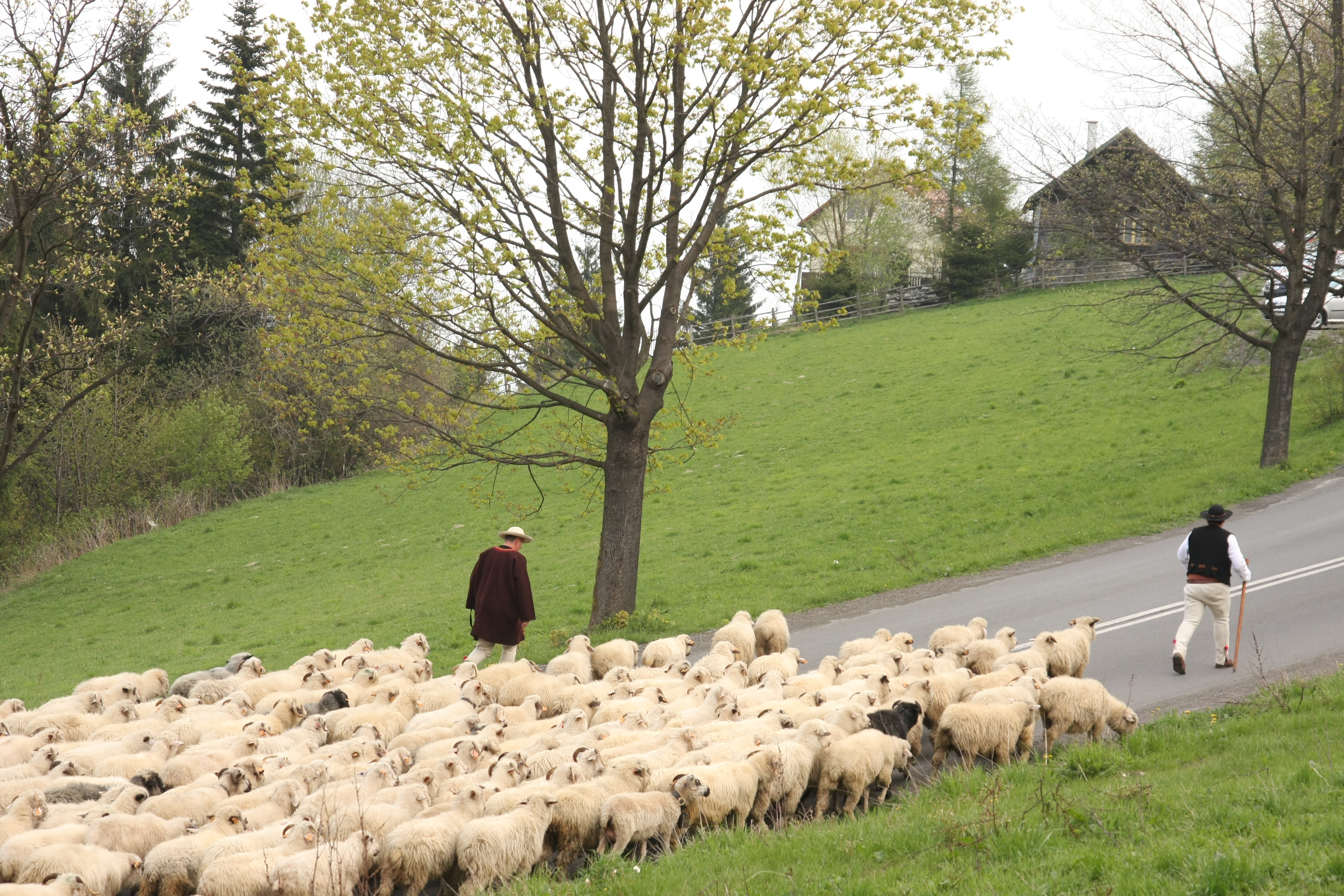 Corocznie w Koniakowie z początkiem maja odbywa się wiosenny redyk tzw. miyszanie owiec, podczas którego kilka mniejszych stad łączy się w jedno wielkie. Gazdowie oddają pod opiekę swoje stada bacy, który wraz z juhasami wyrusza na redyk na Ochodzitą. W tym dniu można zobaczyć odświętne regionalne stroje, usłyszeć głos trombity oraz zobaczyć pastereskie zwyczaje np. poświęcenie stada, okadzanie koszora i miyszani owiec wokół moja ustawionego na szczycie Ochodzitej.